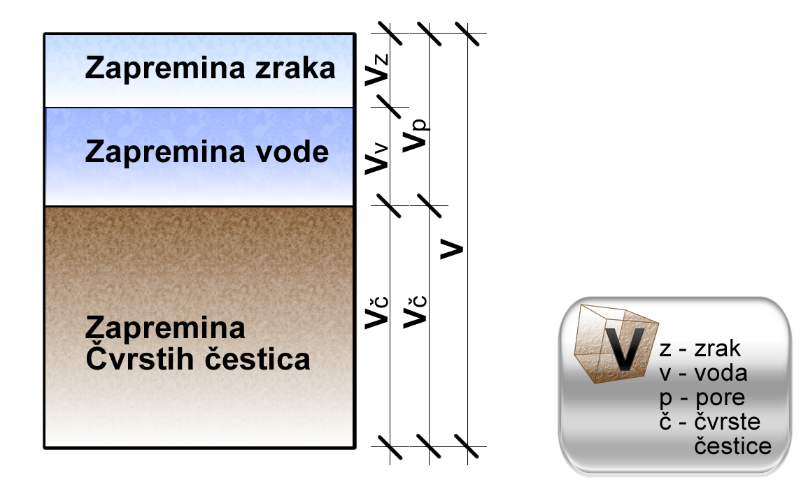 Trofazni sistem tla